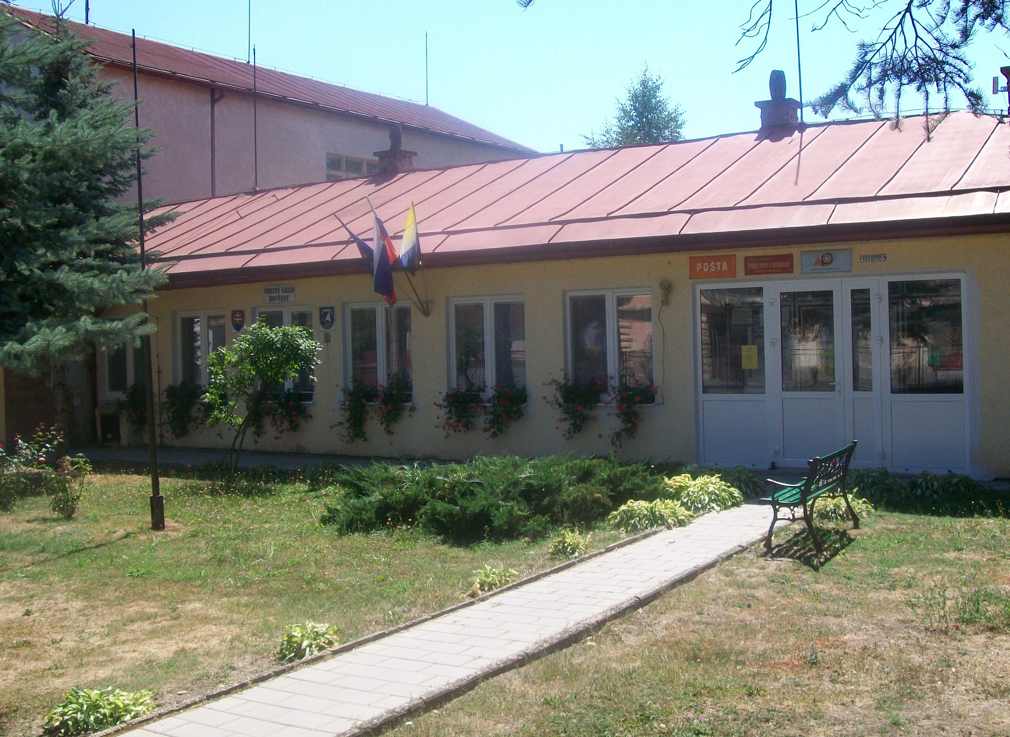 Obecný úrad a pošta v obci Rovňany